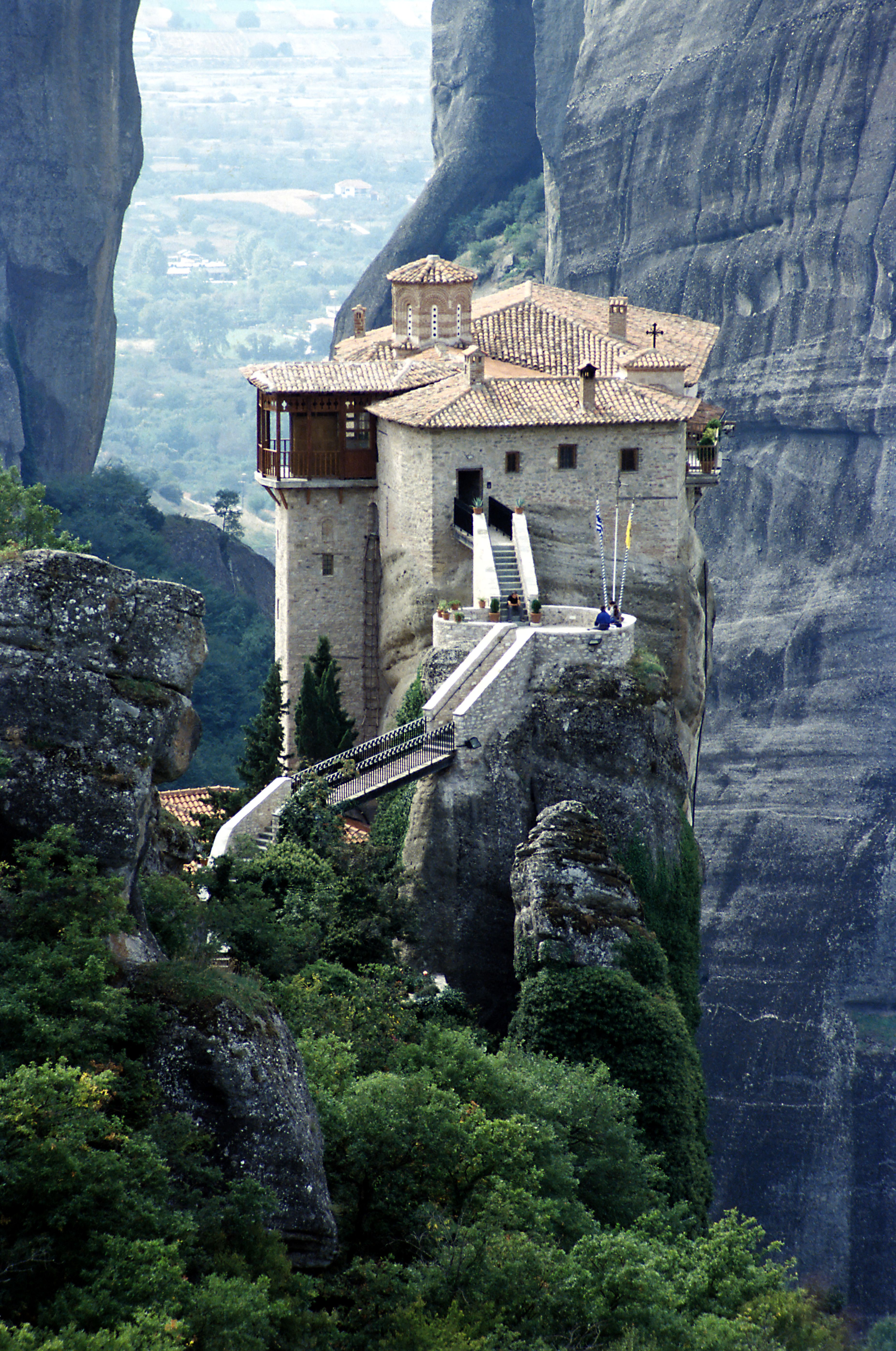 Kloster Rusánu, rechts dahinter liegt der Agion-Pnewna-Turm mit dem »Mönchsgefängnis« Filakaé Monakón. Der links angebaute Turm am Kloster entstand erst mit dem Nebengebäude links unterhalb nach 1992.